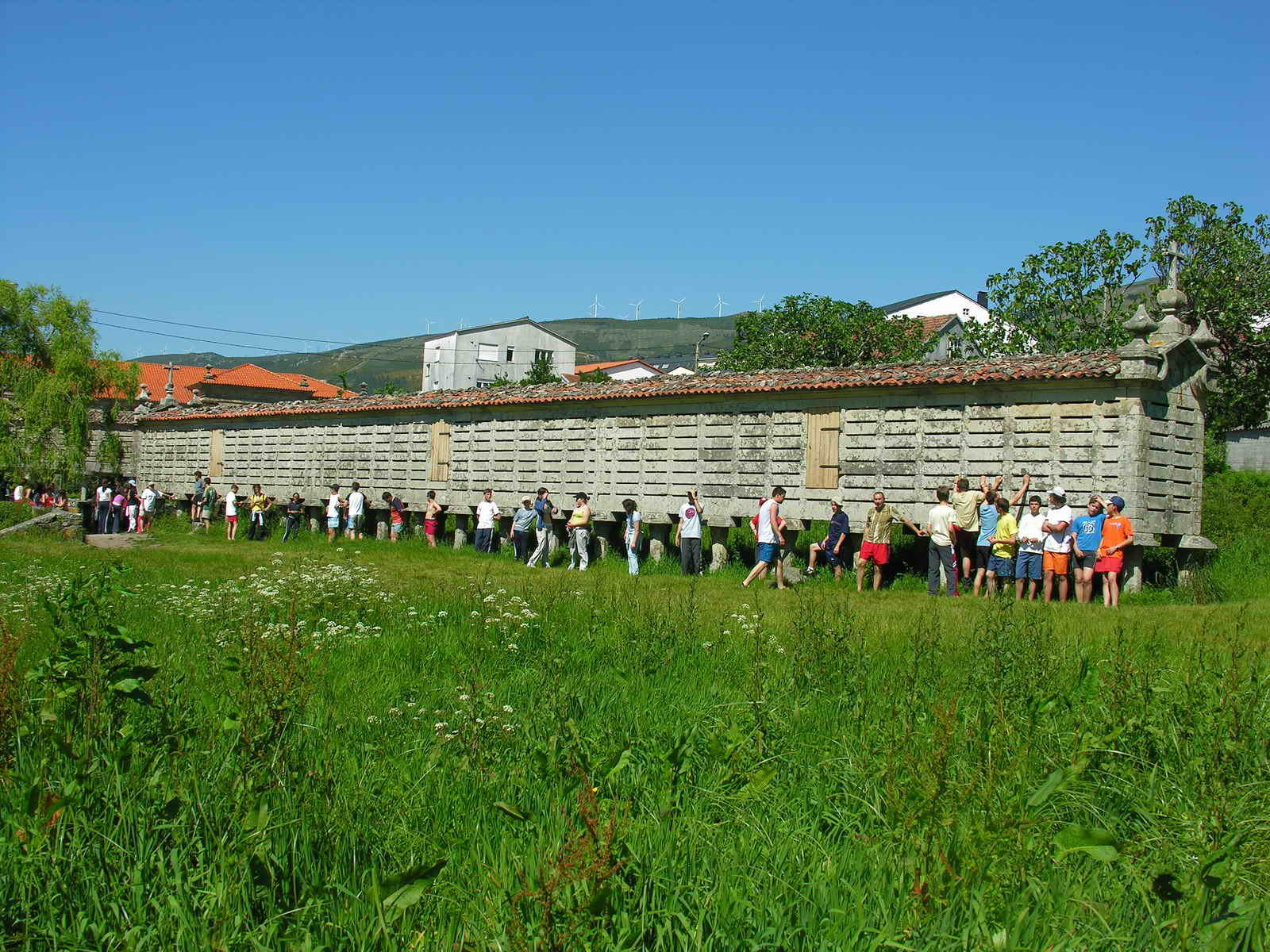 Hórreo de Carnota (A Coruña). Xunto co de Lira (no mesmo concello) o máis grande xamais construído. Foto tirada cunha Nikon E8800. Self made